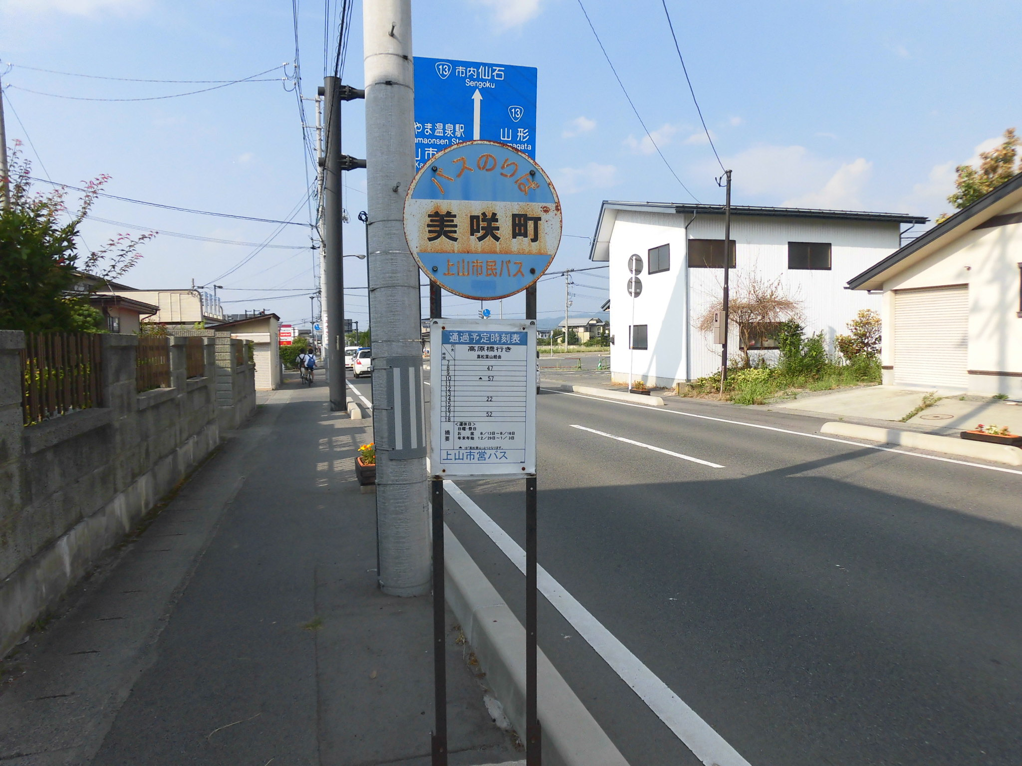 上山市民バス・美咲町バス停（山形県上山市美咲町に所在）